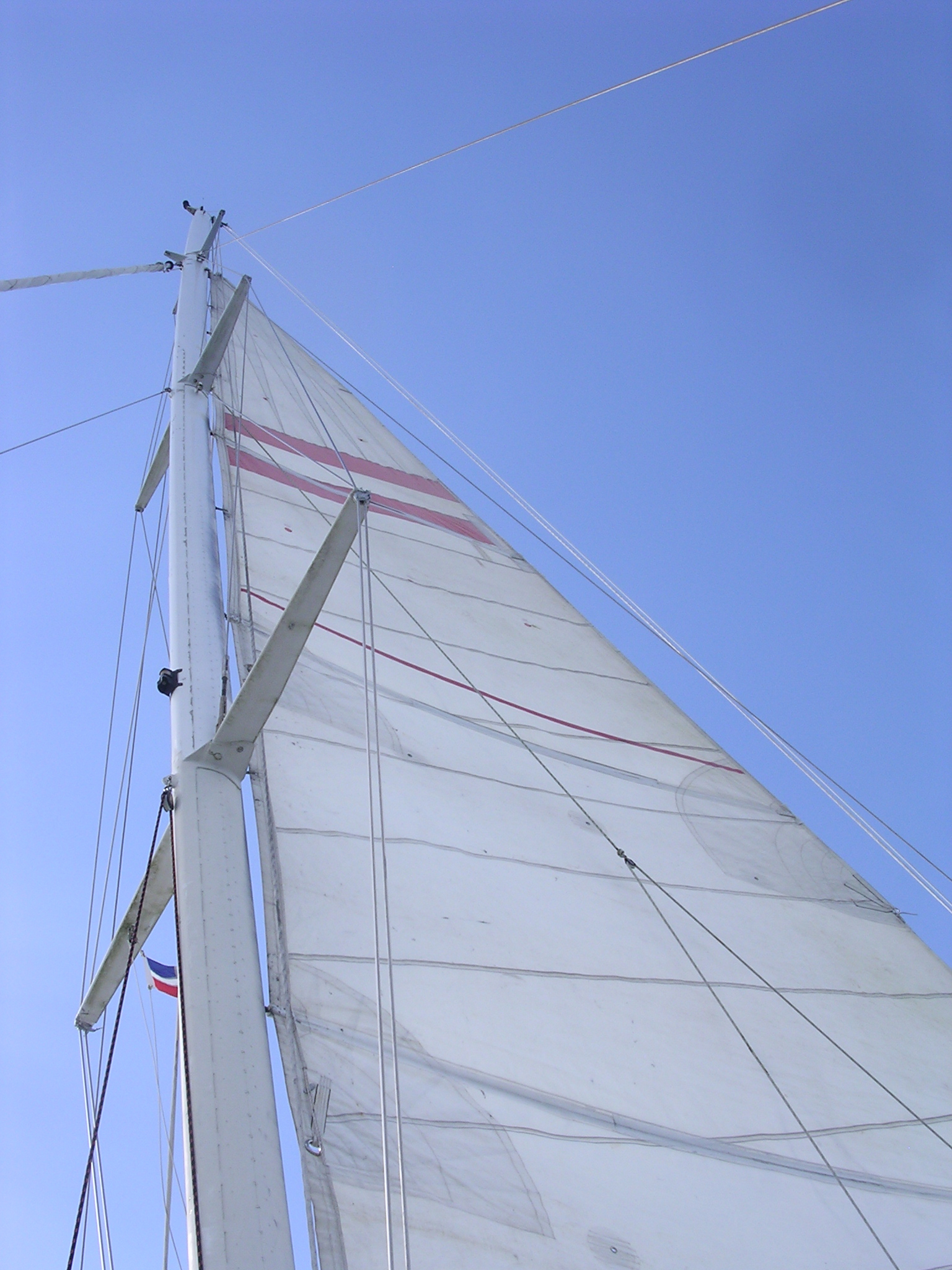 Mast (Alu) / Salinge / Wanten / Großsegel